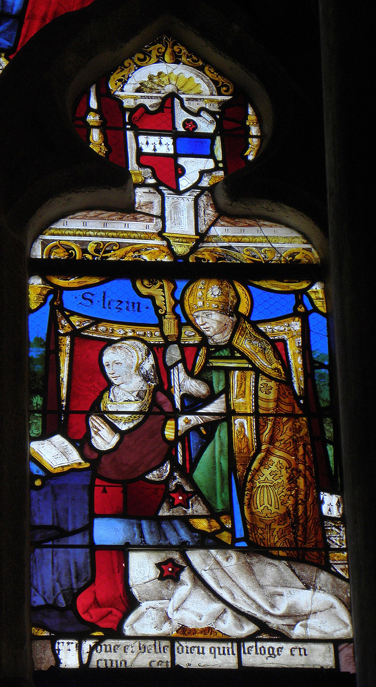 Baie 00 de l'église Saint-Lézin de La Chapelle-Janson (35). Détail.